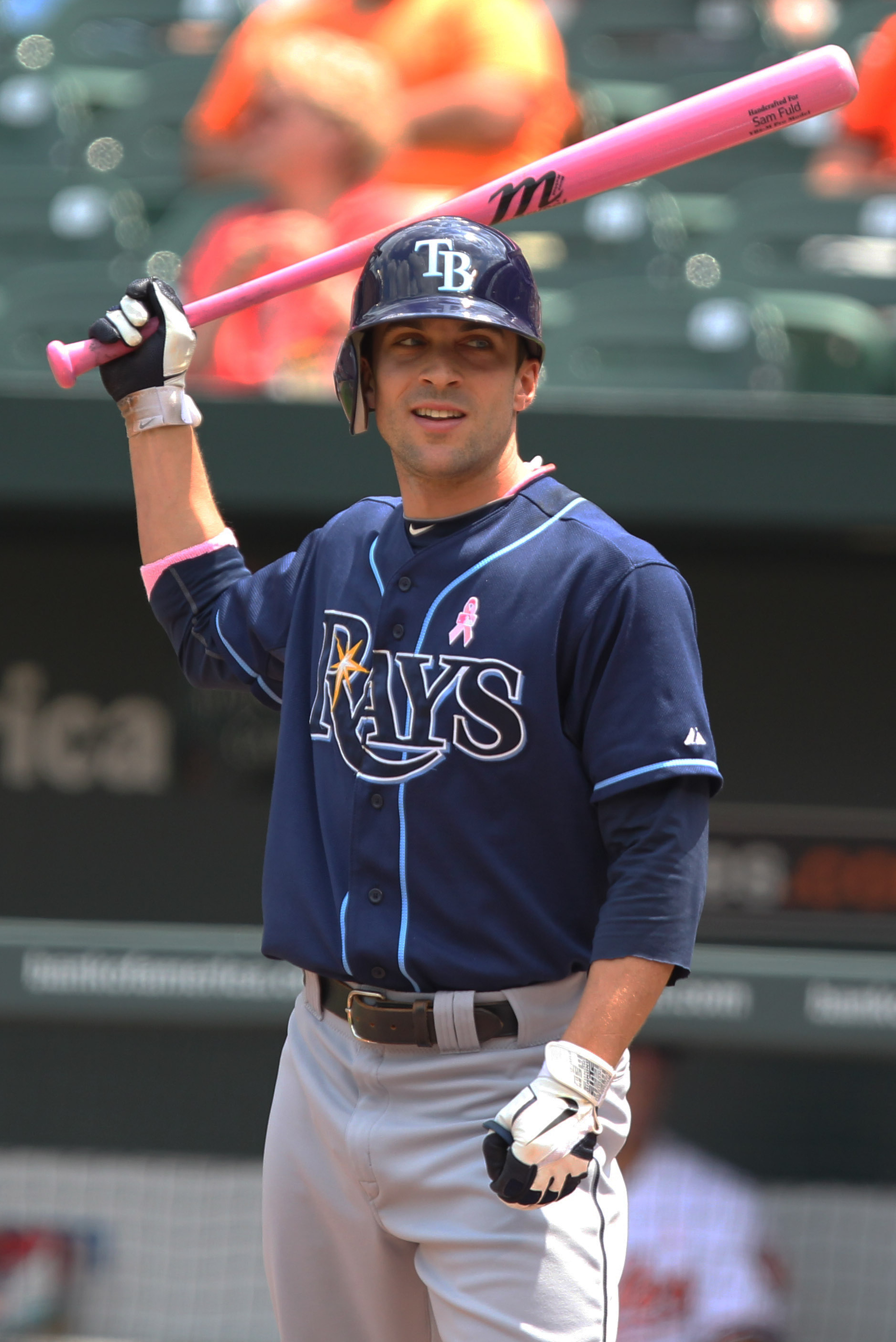 Tampa Bay Rays at Baltimore Orioles on May 8, 2011.